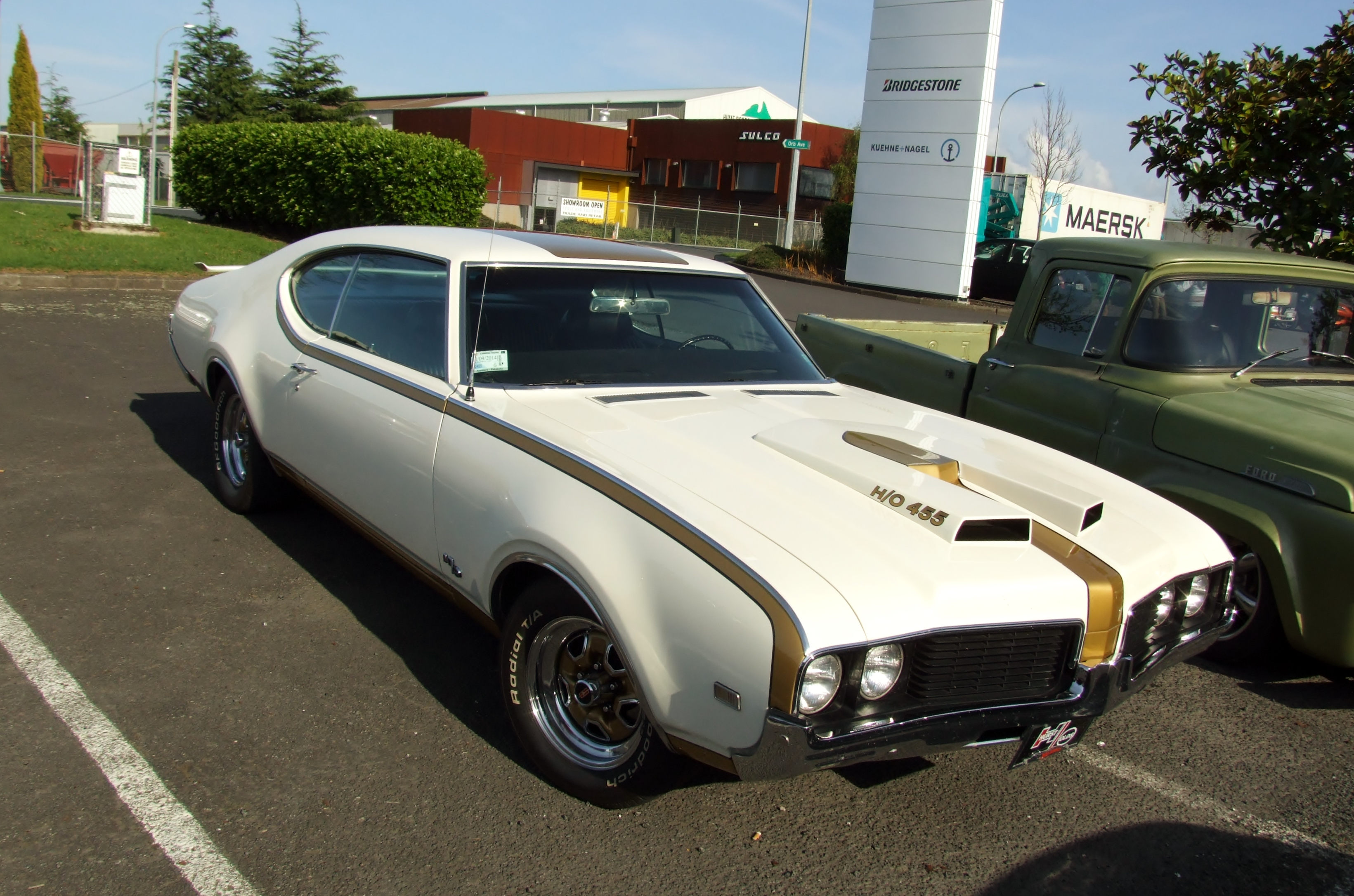 1970 Oldsmobile Hurst H/O 455